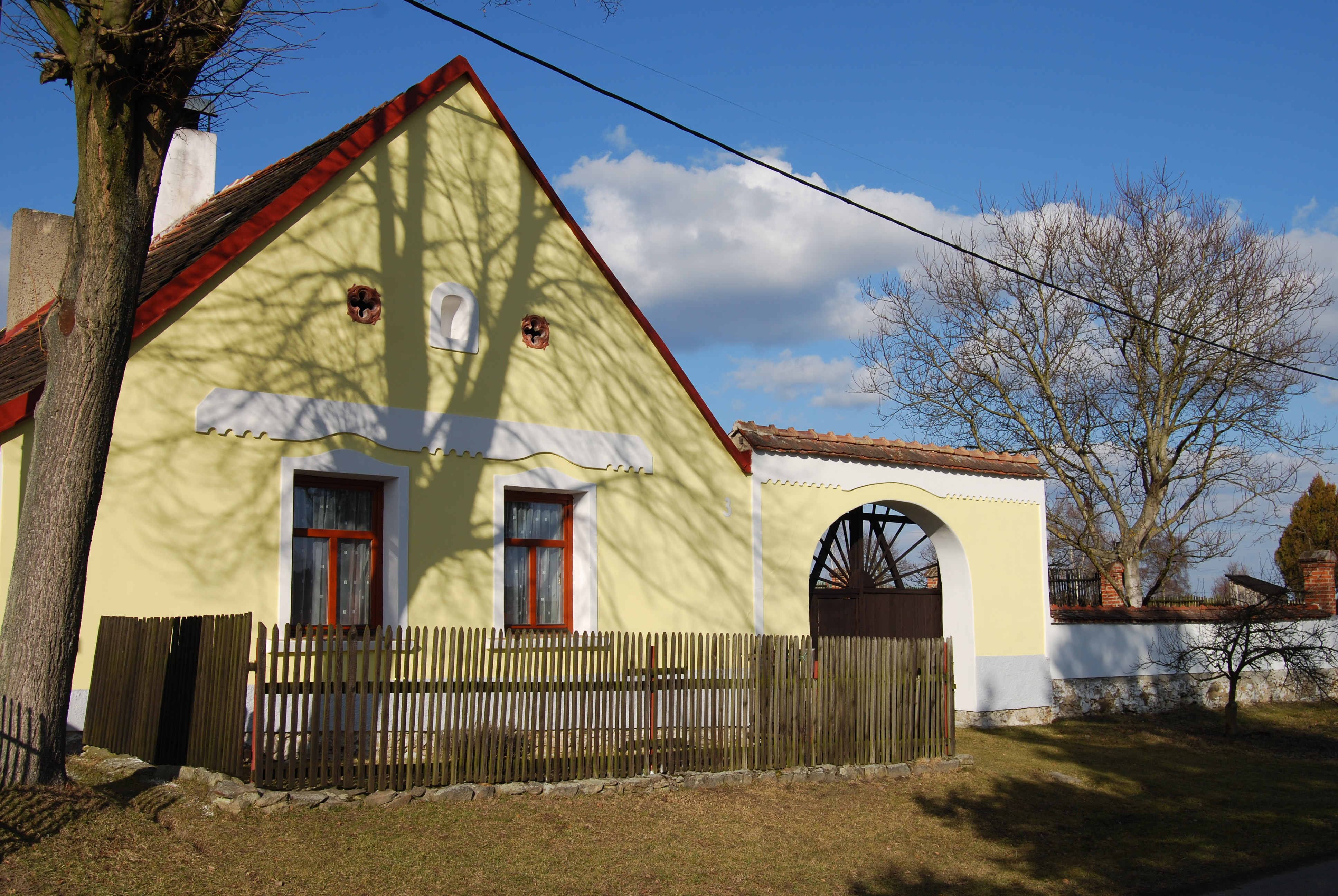 Usedlost v obci. Mladotice je vesnice, část obce Drhovle v okrese Písek. Česká republika.